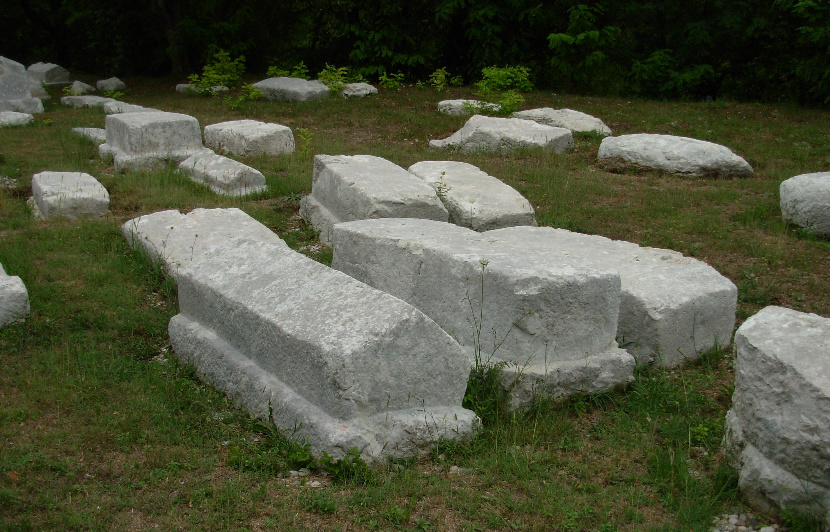 Mramorje, Perućac, Srbija. Slikao Goldfinger